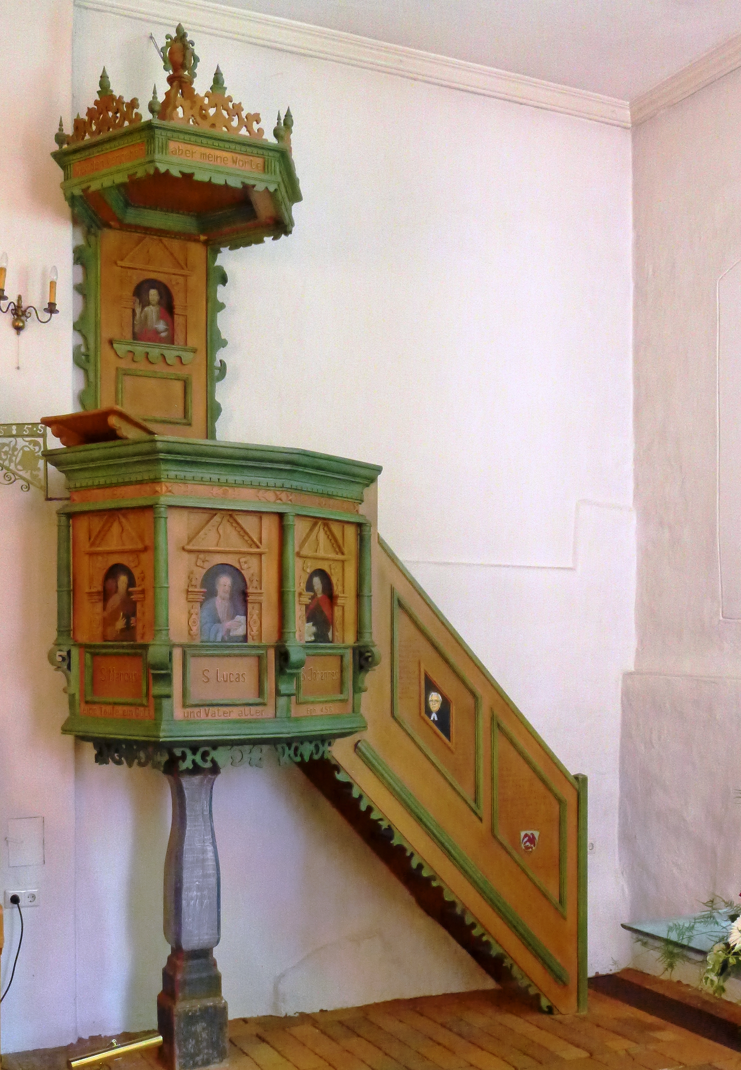 Rekonstruierte Kanzel von 1648 der Dorfkirche Alt-Staaken